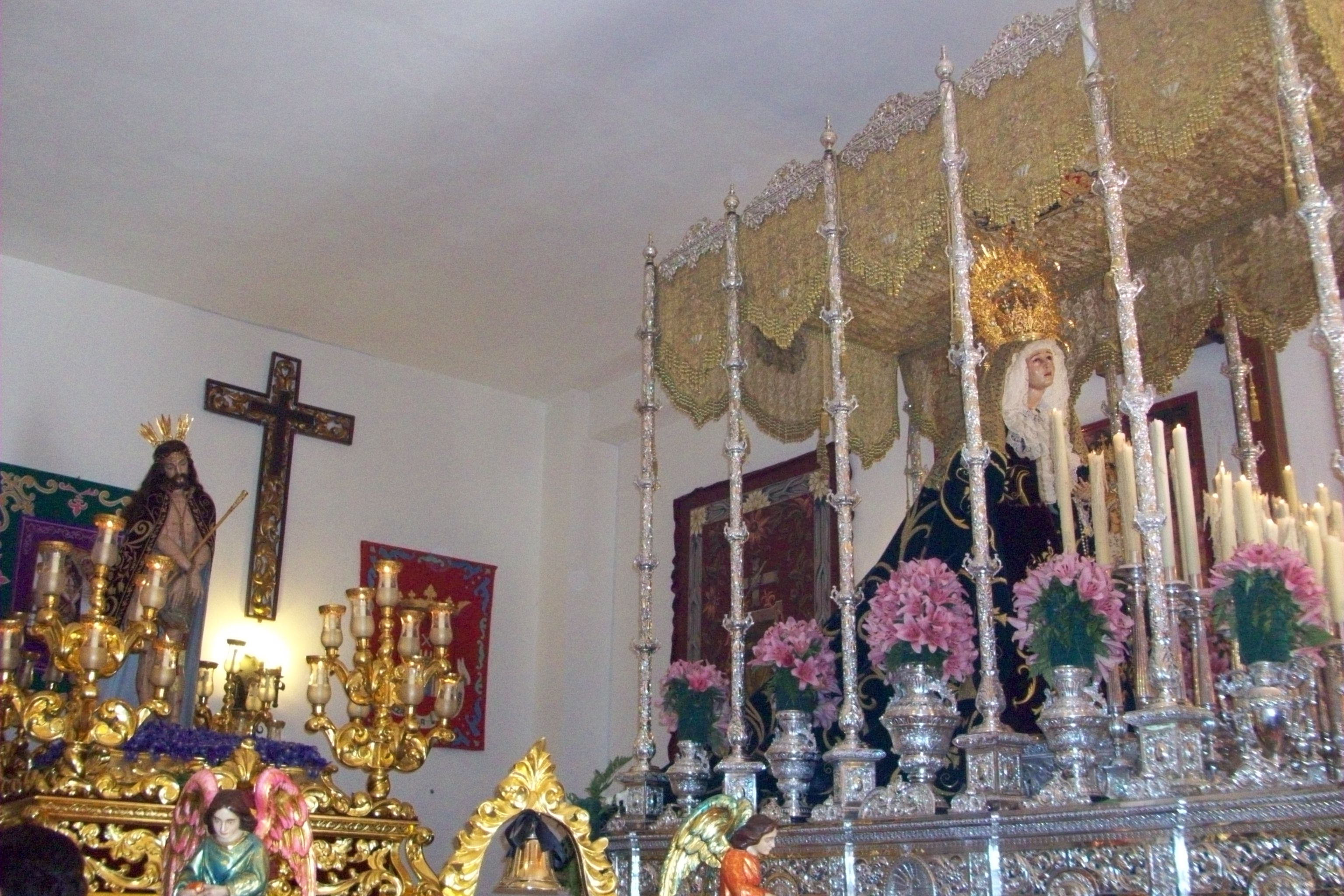 Paso de Cristo y Paso de Palio de la Ilustre Cofradía de la Humildad de Nuestro Señor Jesucristo y Nuestra Señora de los Dolores del Rosario de Baeza (Jaén) en el salón de tronos de su casa de hermandad.